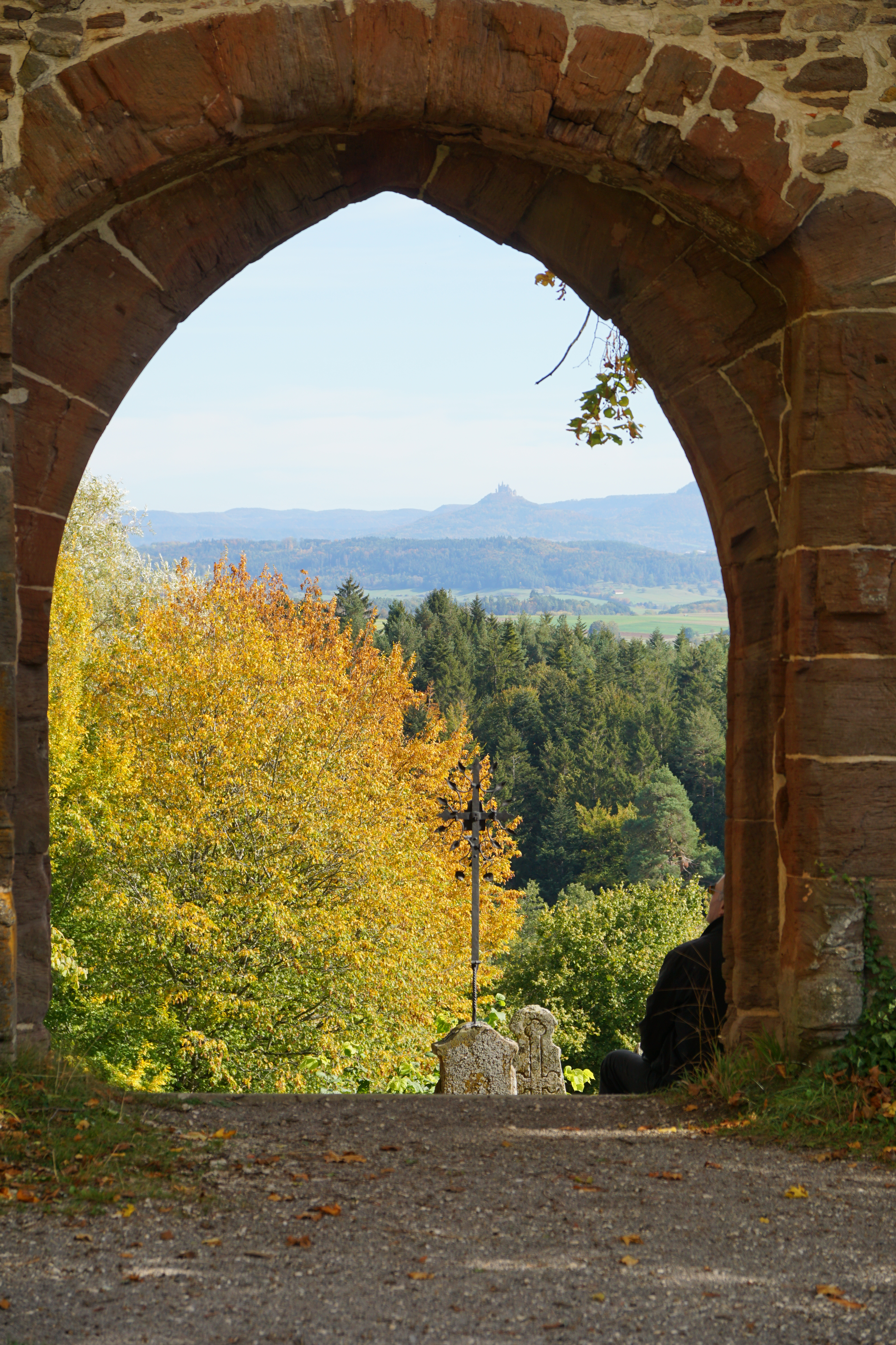 Nonnenfriedhof von Kloster Kirchberg. Es sind einige wenige neuere Gräber auf dem Friedhof von Personen, die keine Nonnen waren.